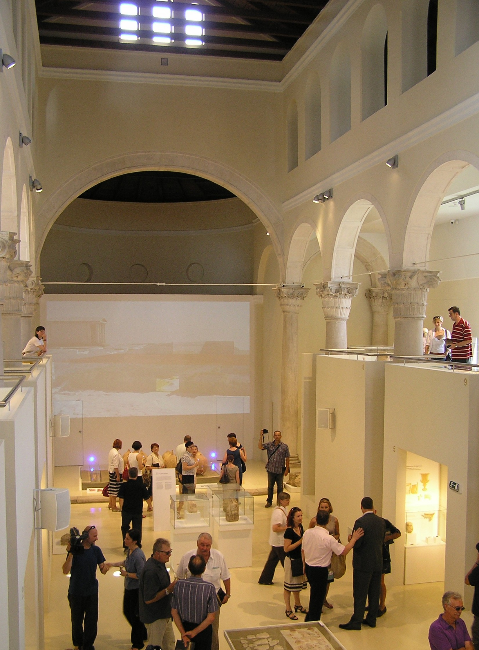 Muzejsko-galerijski prostor Sveta Srca, Pula